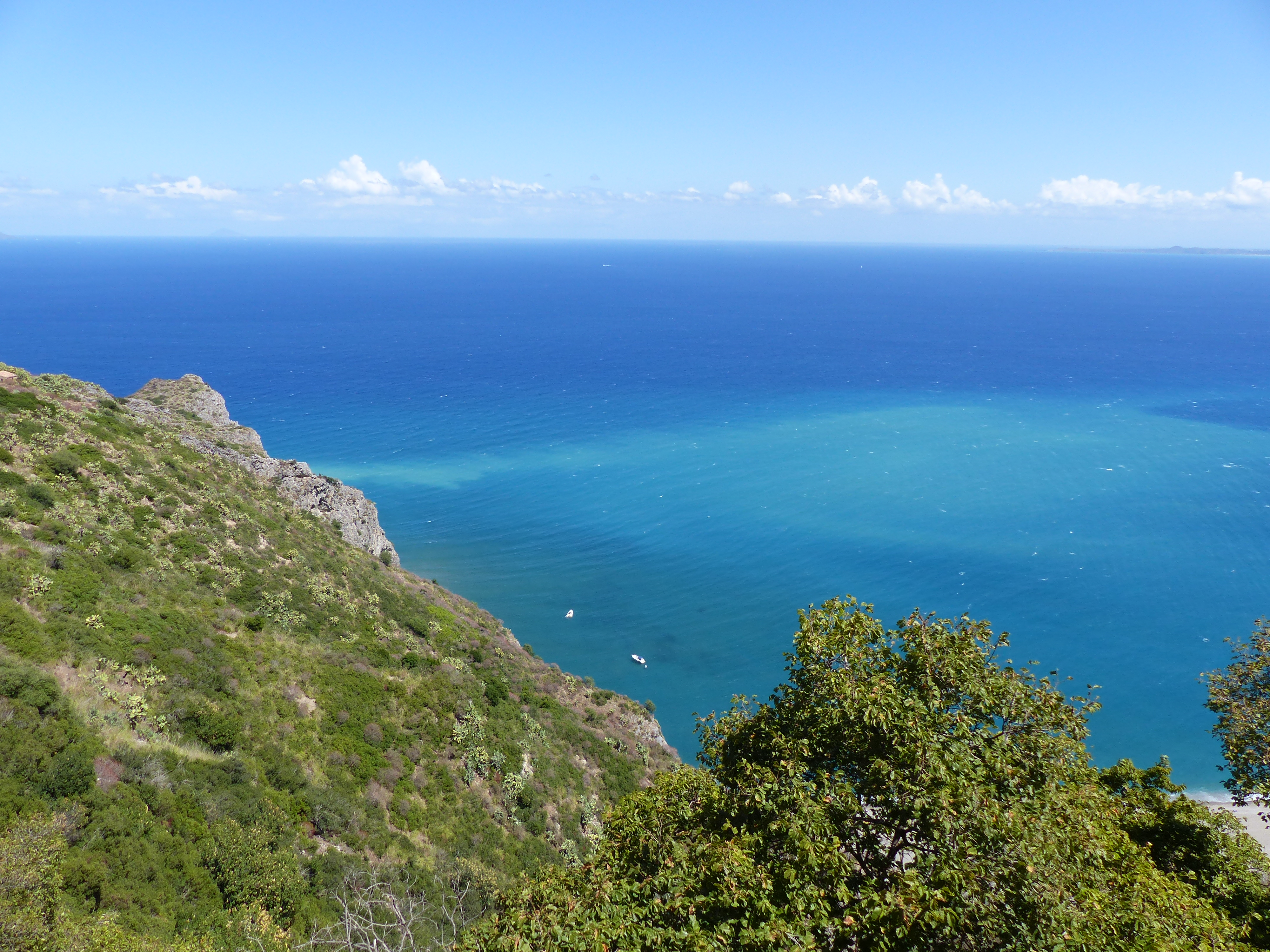 Marinello, azul, Sicilia.